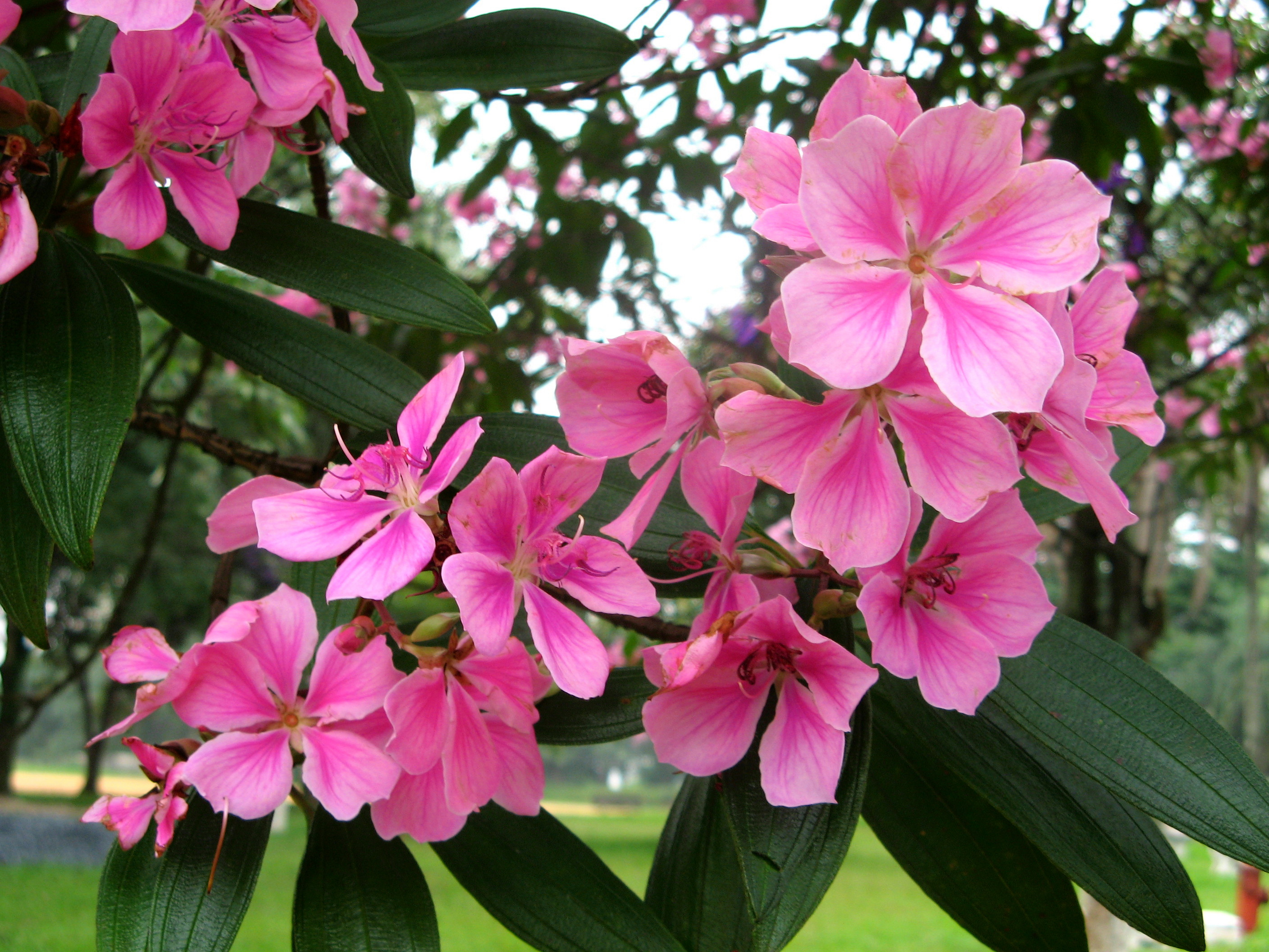 quresmeiras flowers Ceret park sao paulo